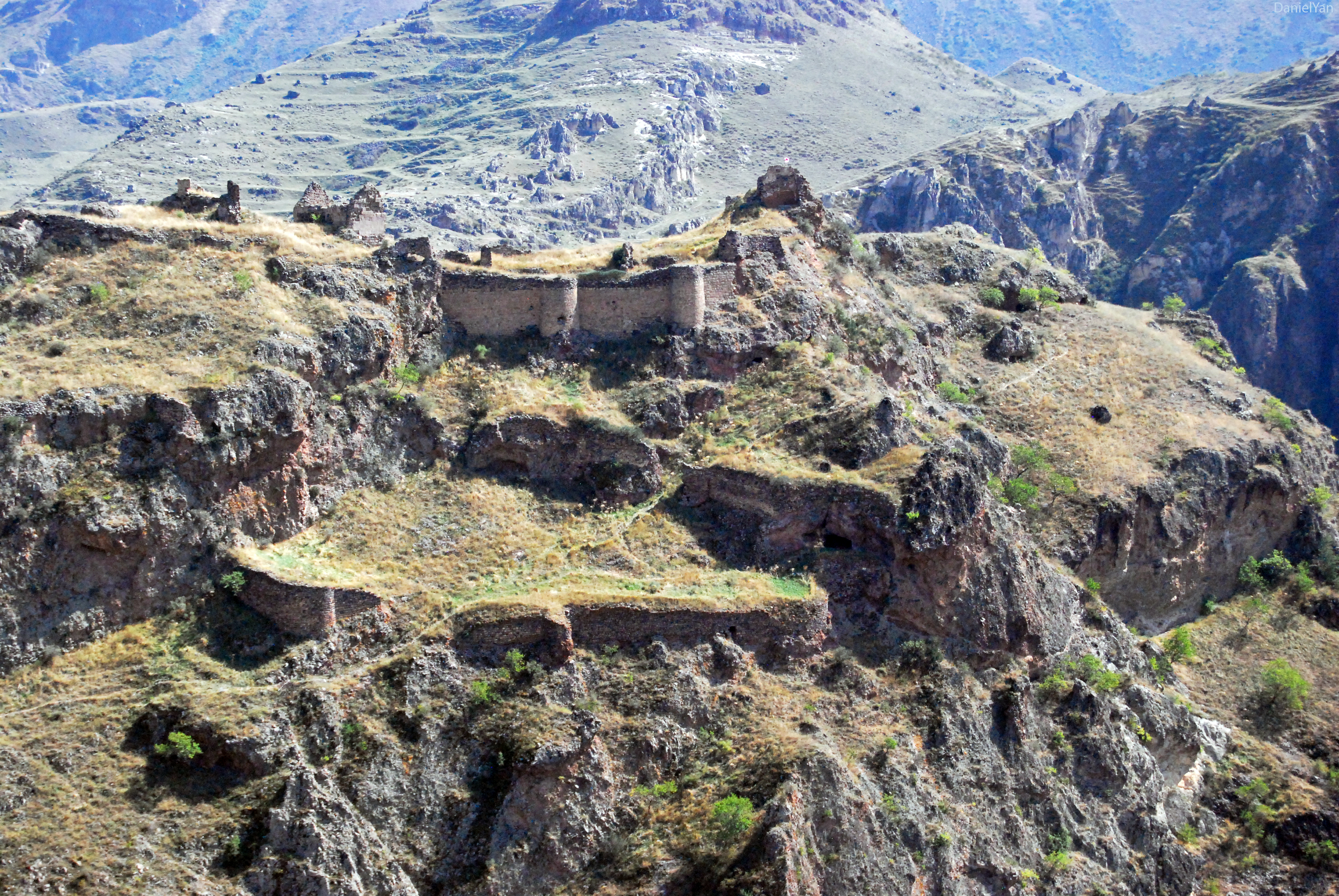 სარგის ჯაყელის ციხე-კოშკი